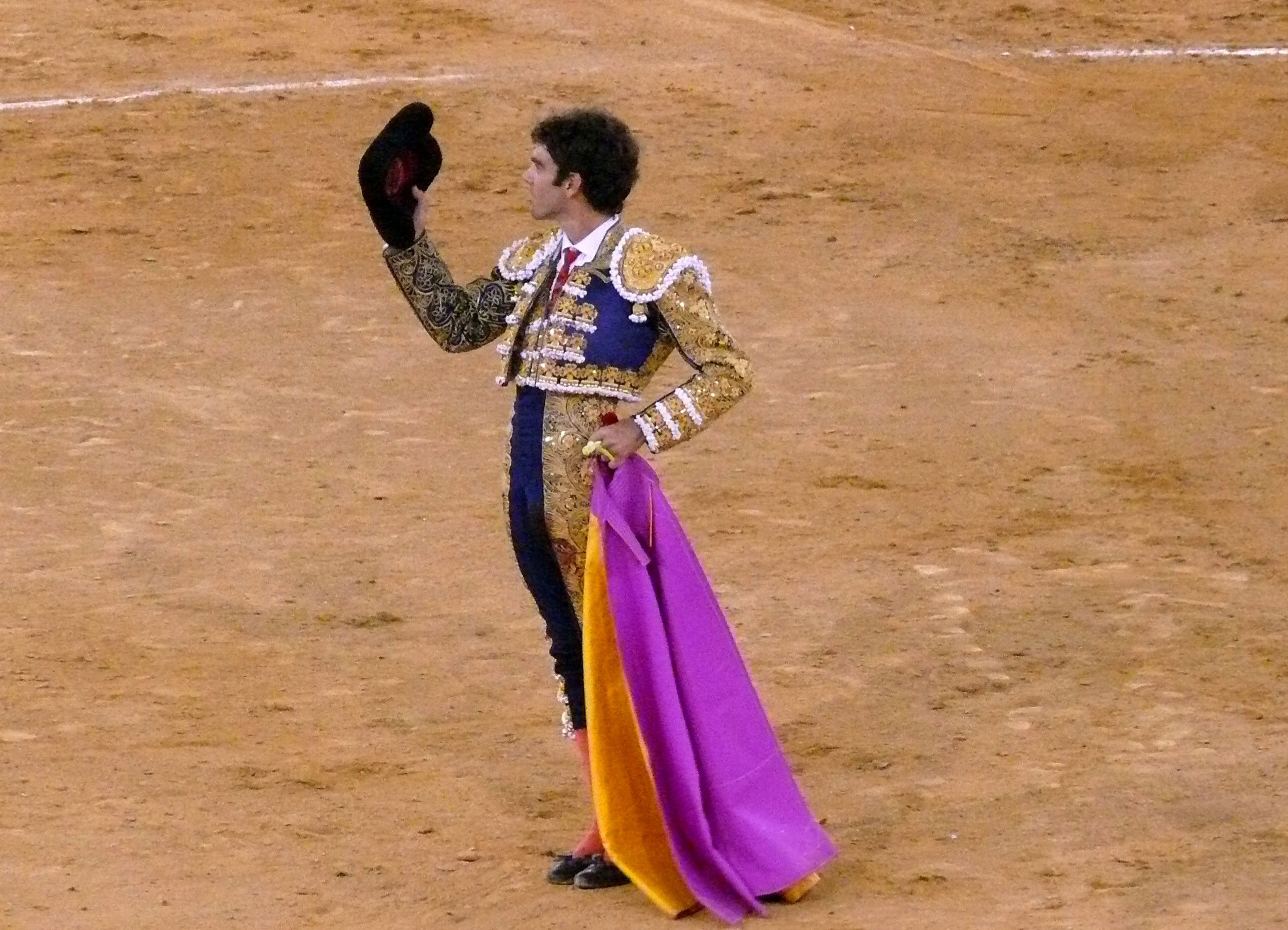 Saludo de José Tomás en Almería (agosto 2008).